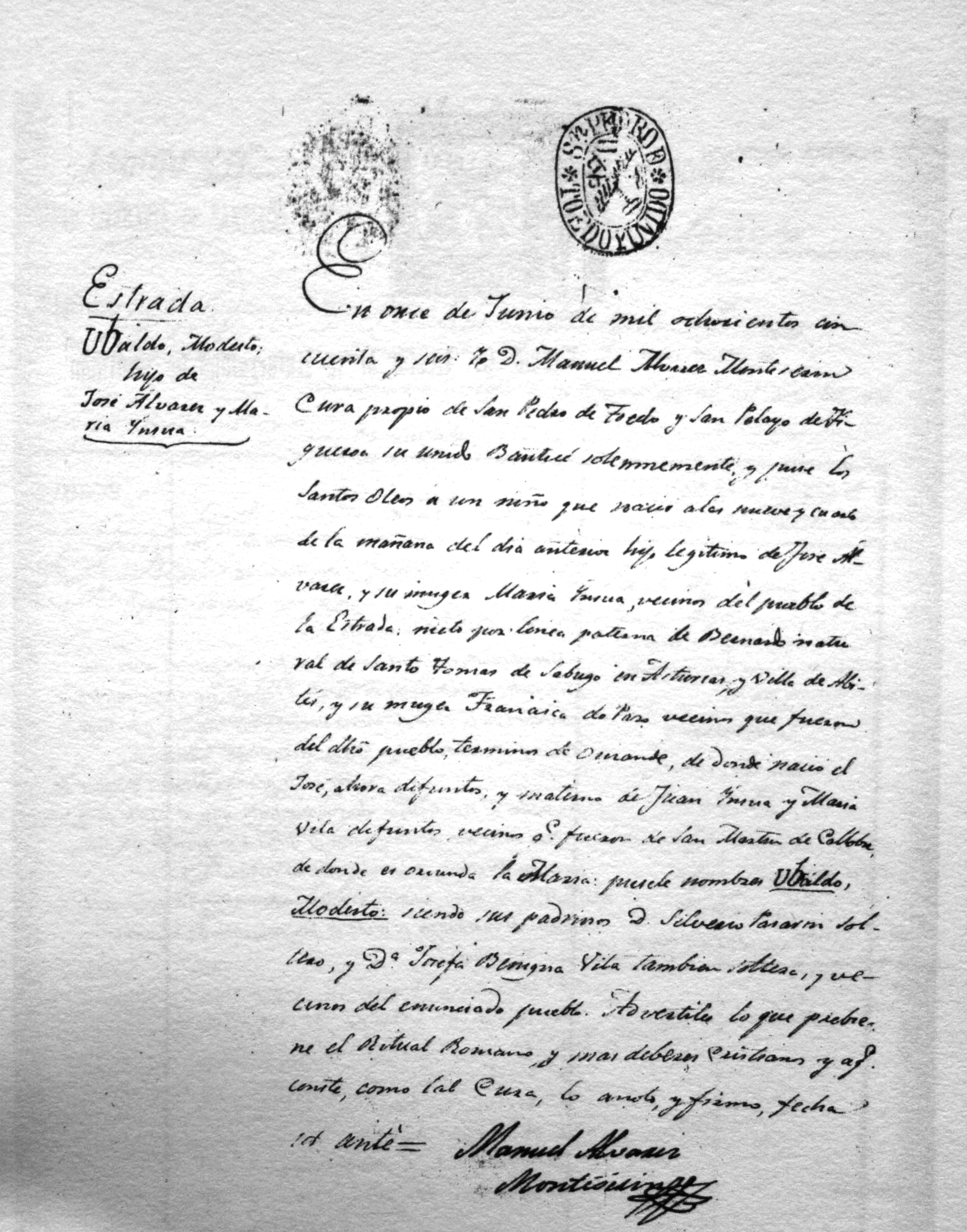 Partida de nacimiento de Waldo Álvarez Insua